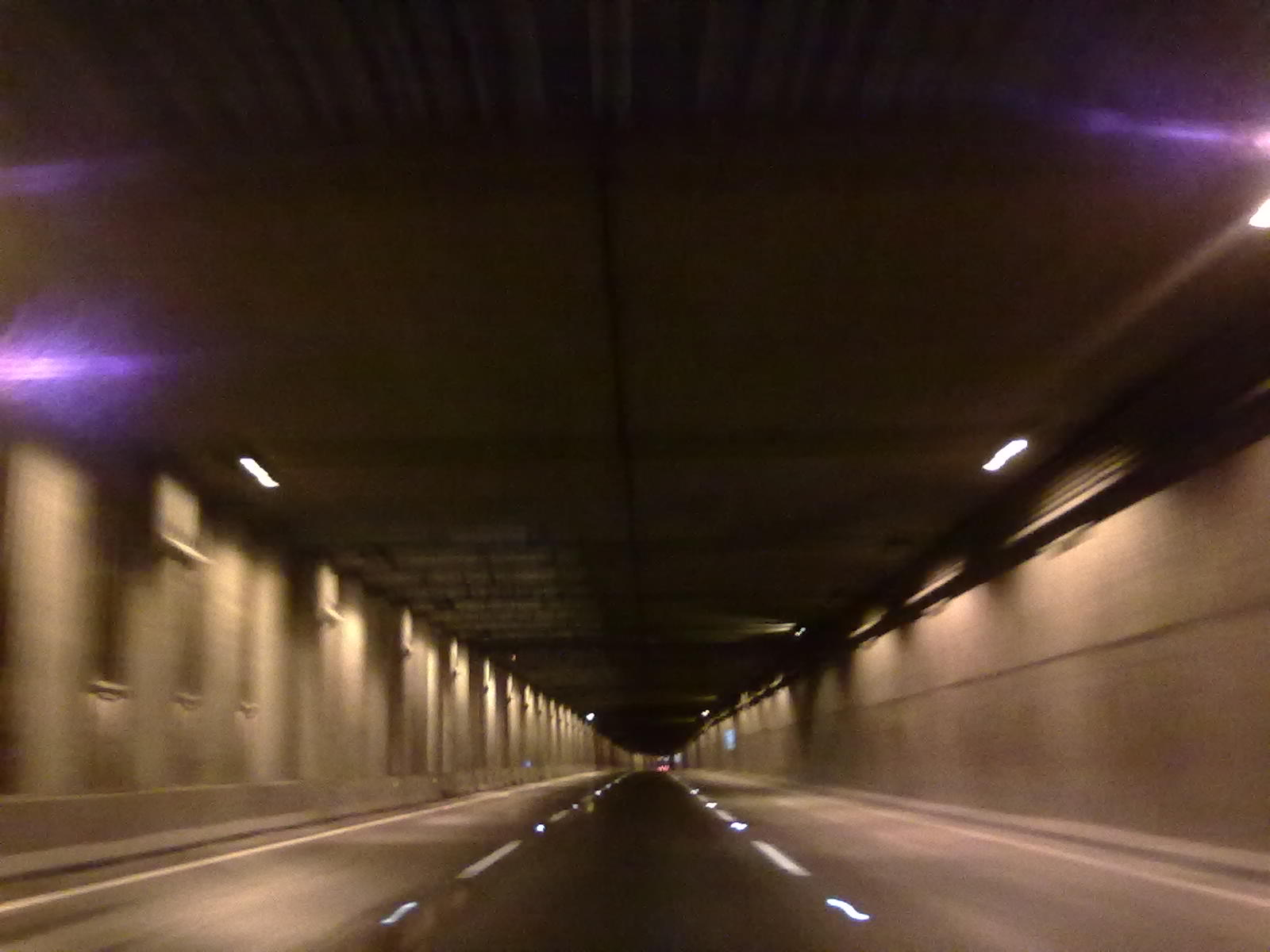 GRAL VELASQ